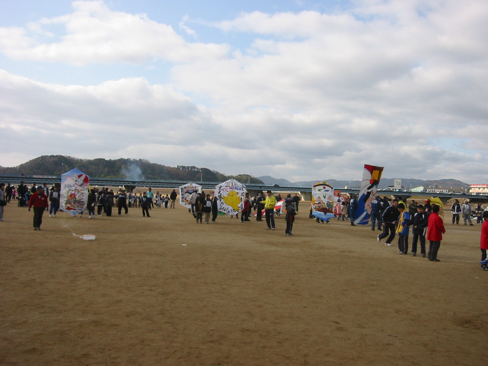 童謡の里龍野凧あげ祭り